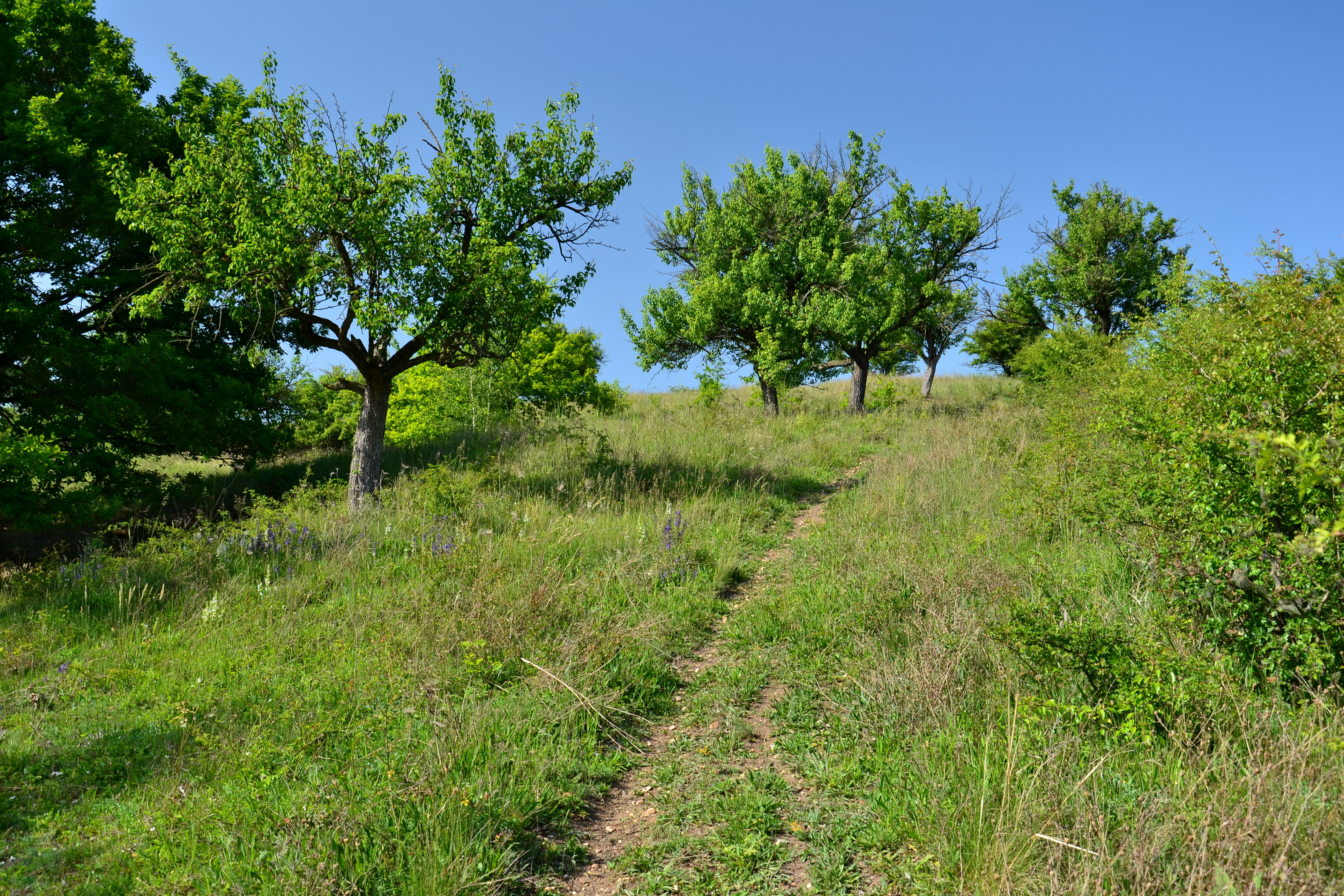 Část chráněného území severně od Truzenic